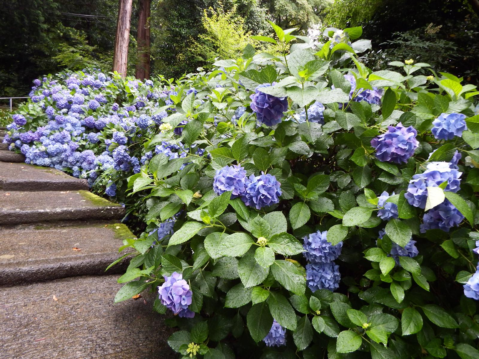 白峯寺の紫陽花